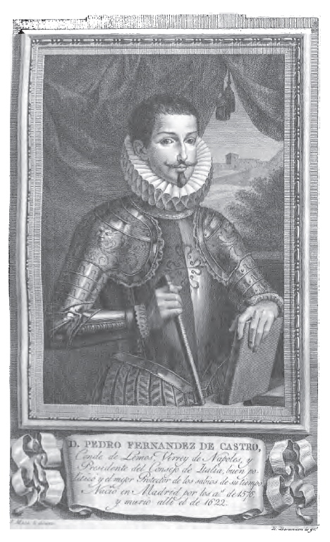 Retrato de Pedro Fernández de Castro Andrade y Portugal. Conde de Lemos.